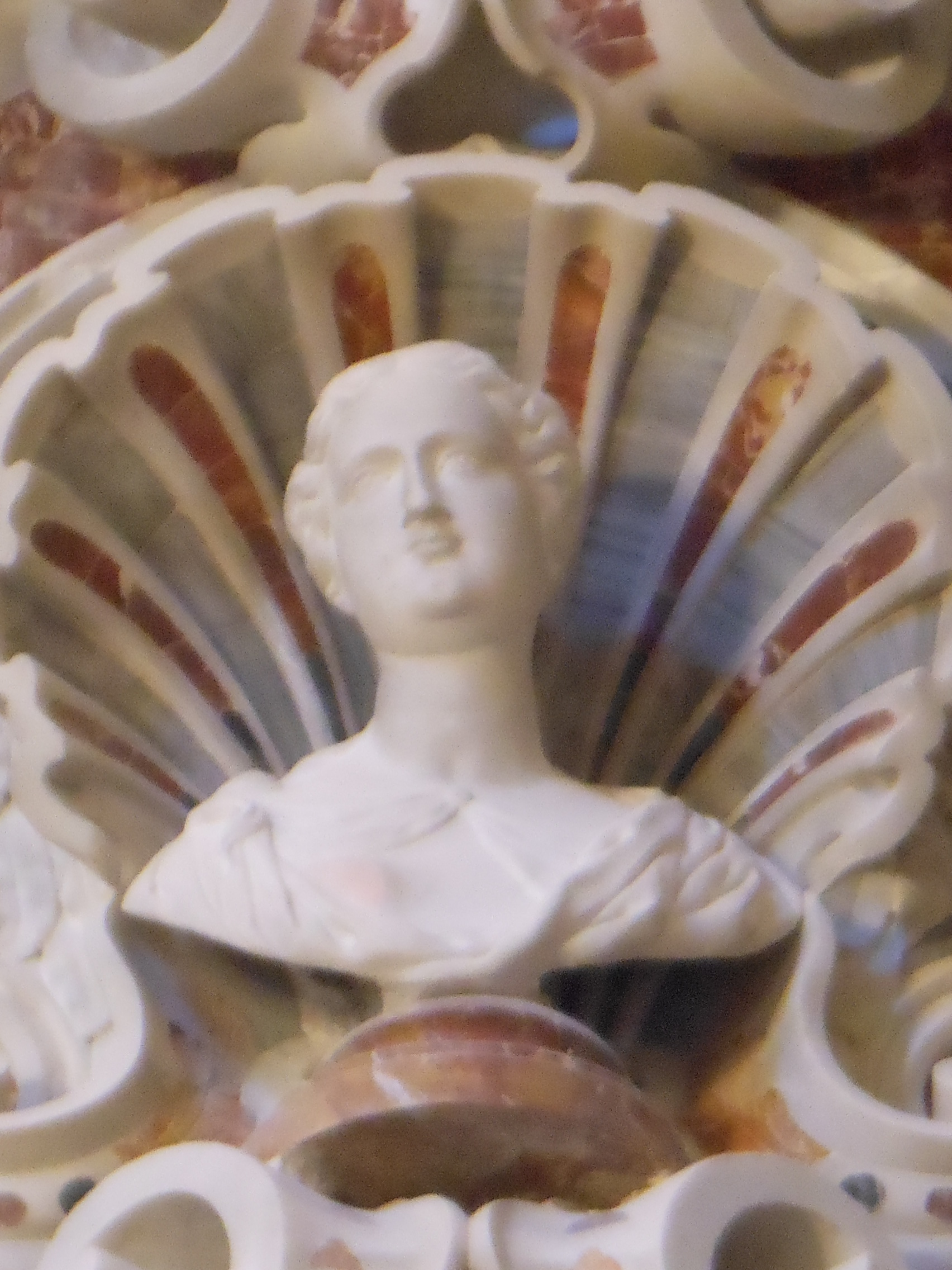 Mezzo busto di Allegranza Sanclemente, baronessa di Inici